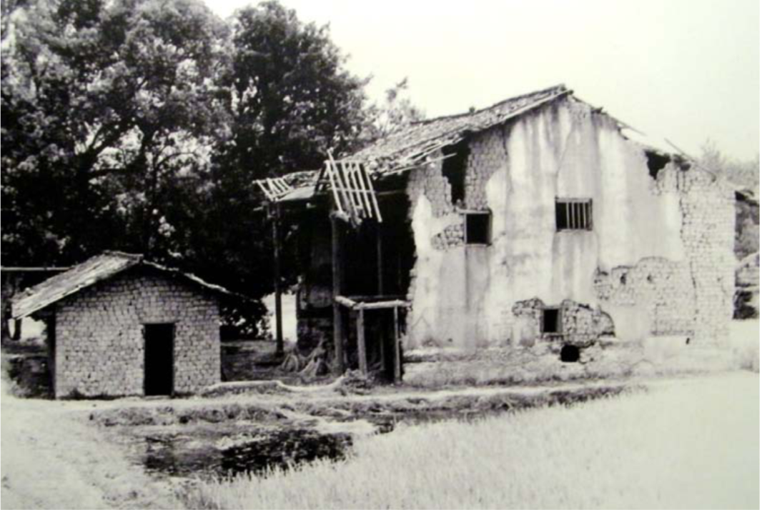 中文（中国大陆）: 红中社新闻台旧址：瑞金沙洲坝下肖区的一座破庙。现已无存。